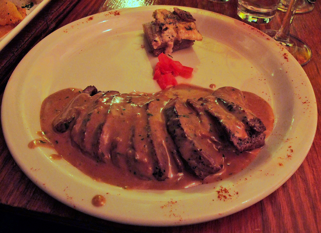 Gigot d'agneau à la poêle